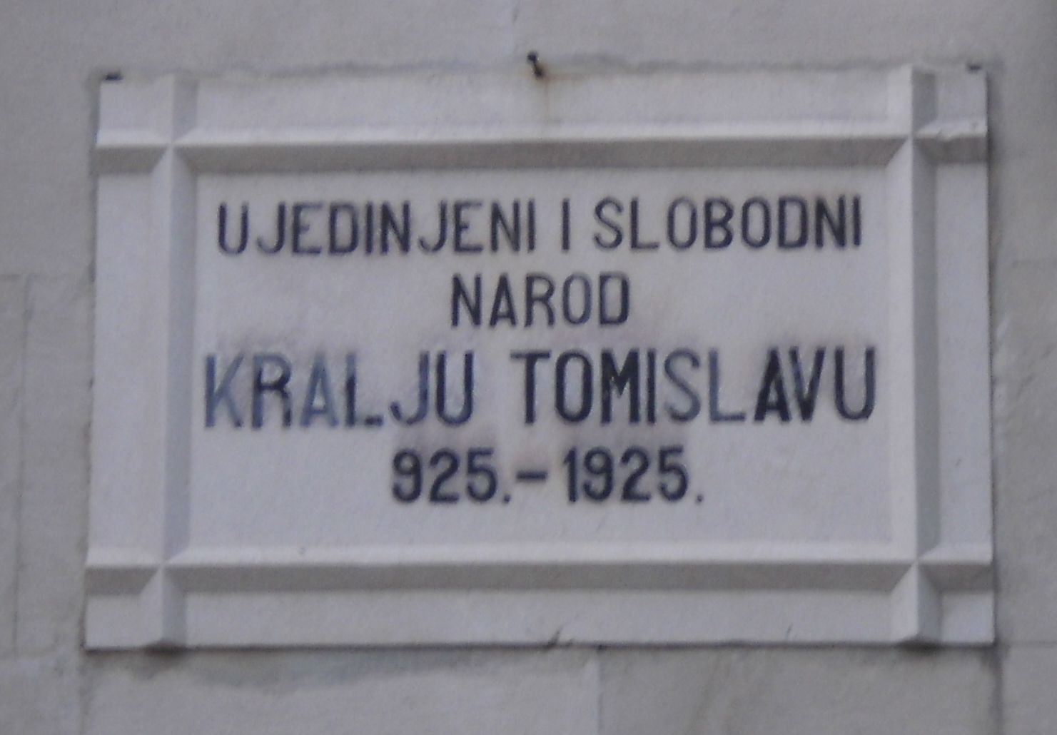 Spomen ploča kralju Tomislavu ,crkva Pomoćnice kršćana, Orebića